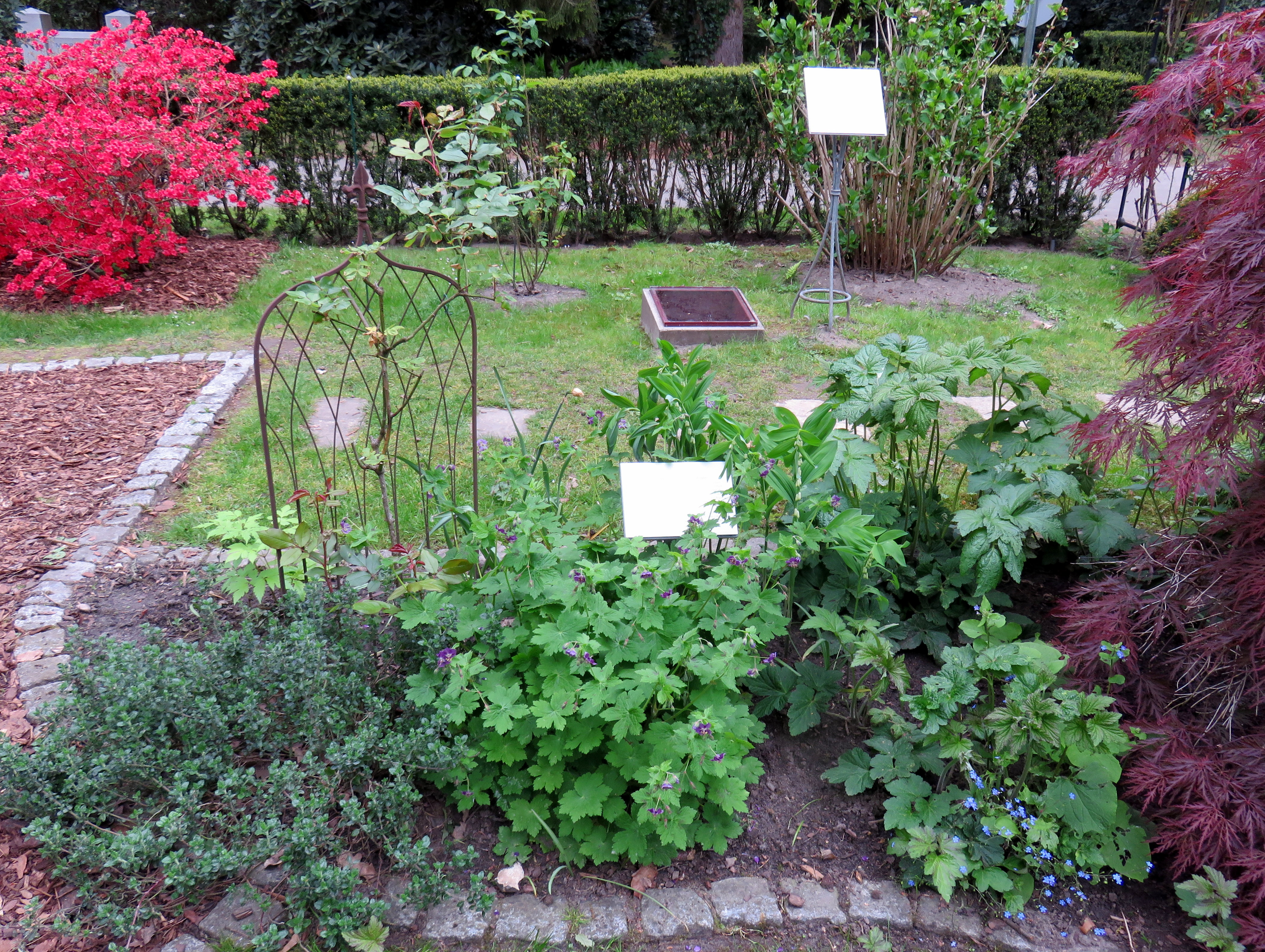 Rosenpflanze mit dem Namen “Andenken an Alma de l'Aigle” zu Ehren Hamburger Pädagogin und Rosenexpertin Alma de l’Aigle im Bereich des Gartens der Frauen auf dem Ohlsdorfer Friedhof.